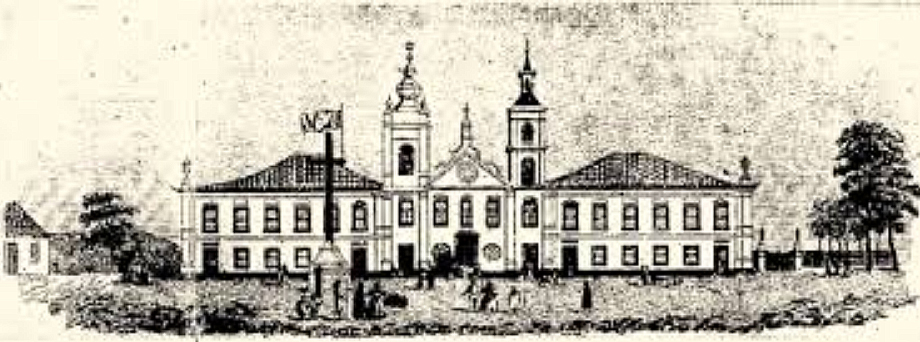 A sede da Real Fazenda de Santa Cruz